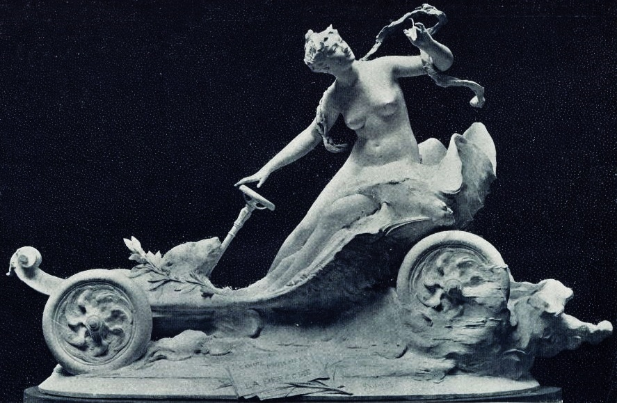 La Coupe des Pyrénées 1905 - La Vie au Grand Air du 7 juillet 1905, p.559